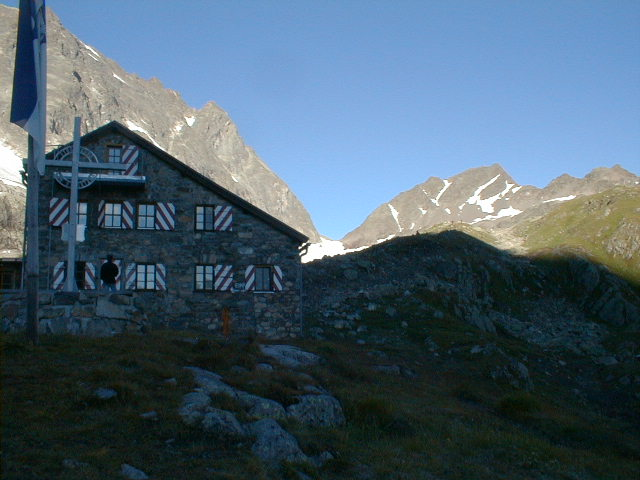 Darmstädter Hütte im Verwall (Tirol, Österreich) mit Blick zum Gipfel des Scheiblers